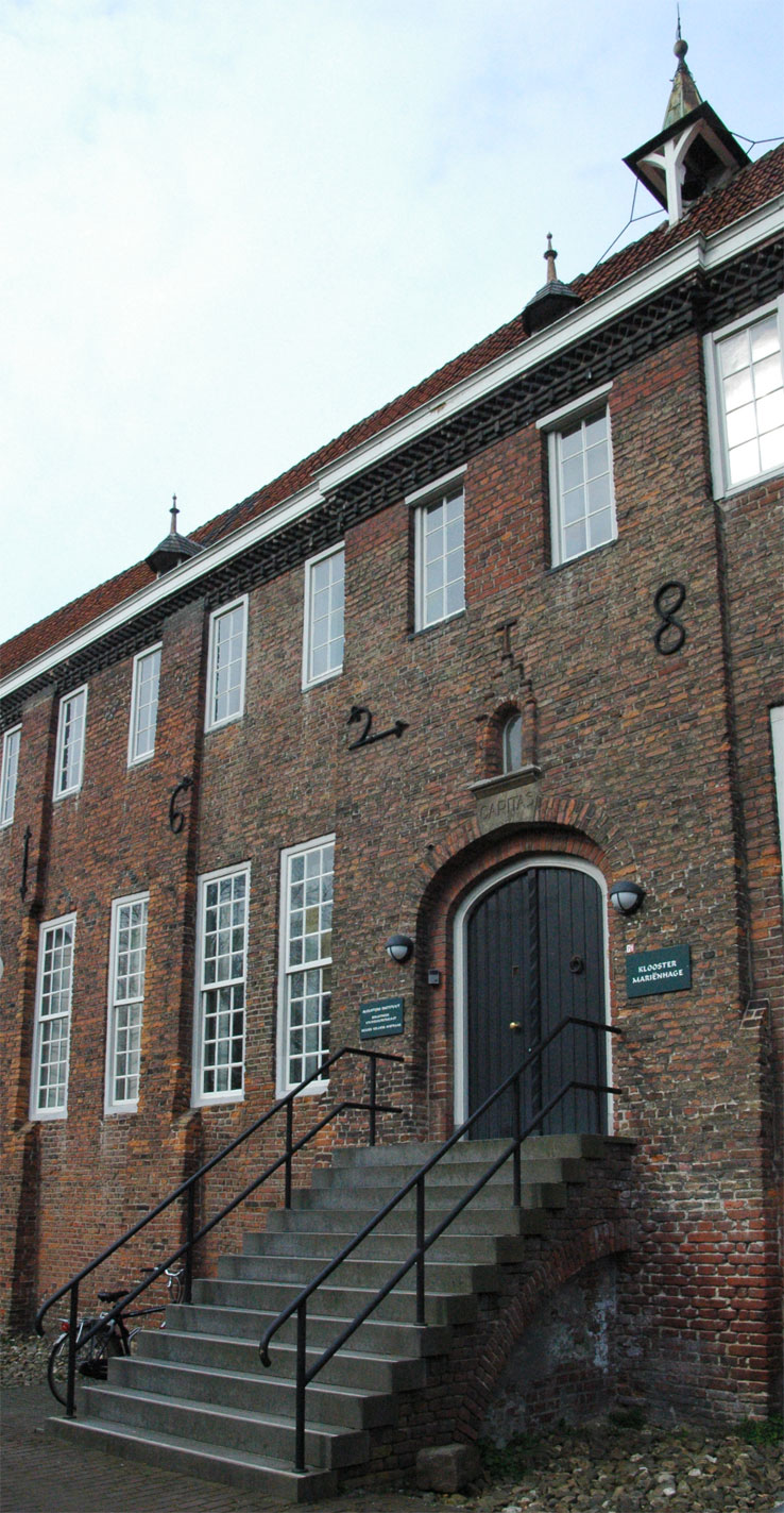 Oostgevel van klooster Mariënhage te Eindhoven, Nederland.